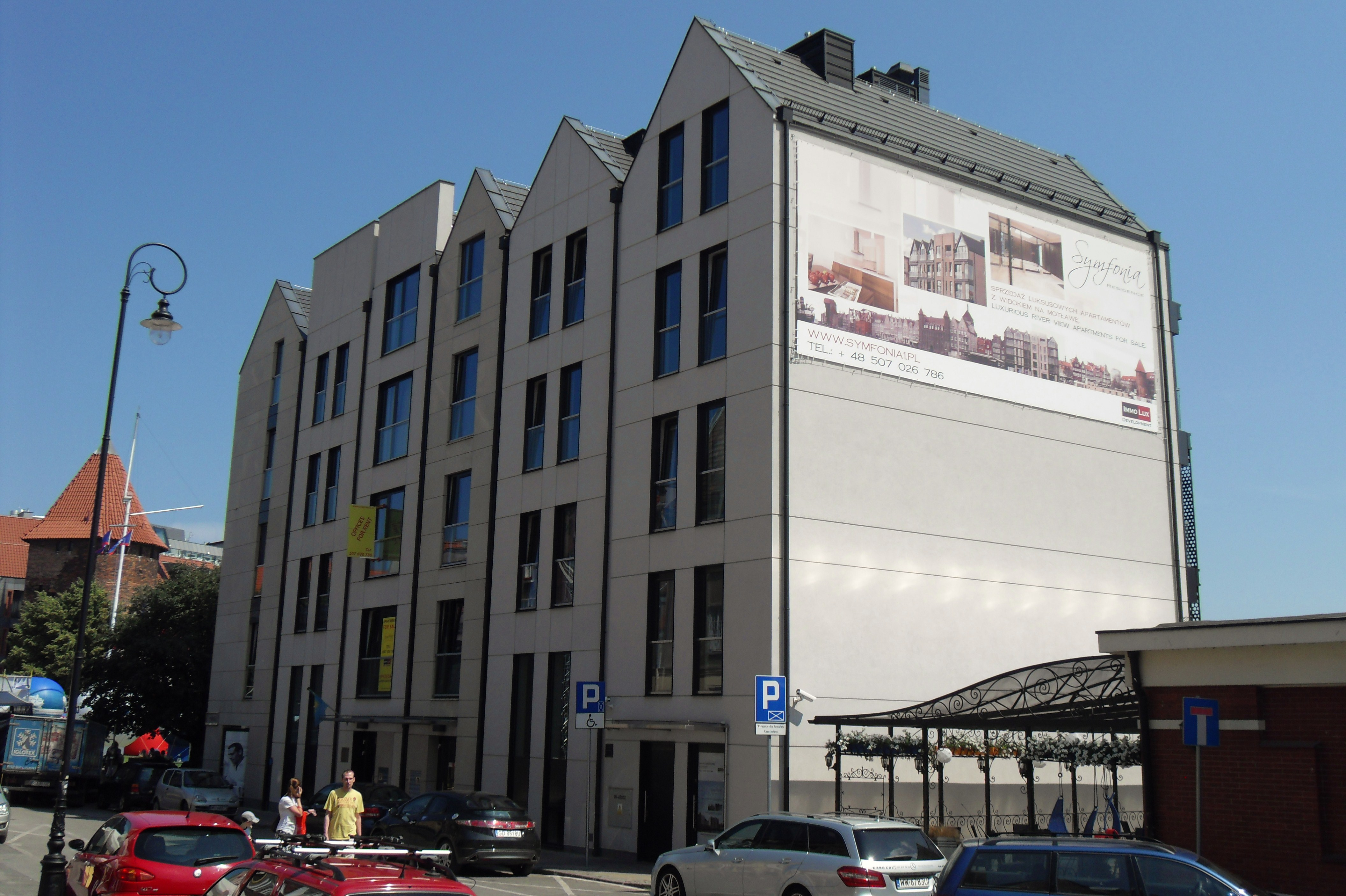 Gdańsk. Targ Rybny 11, budynek "Symfonia Residence".